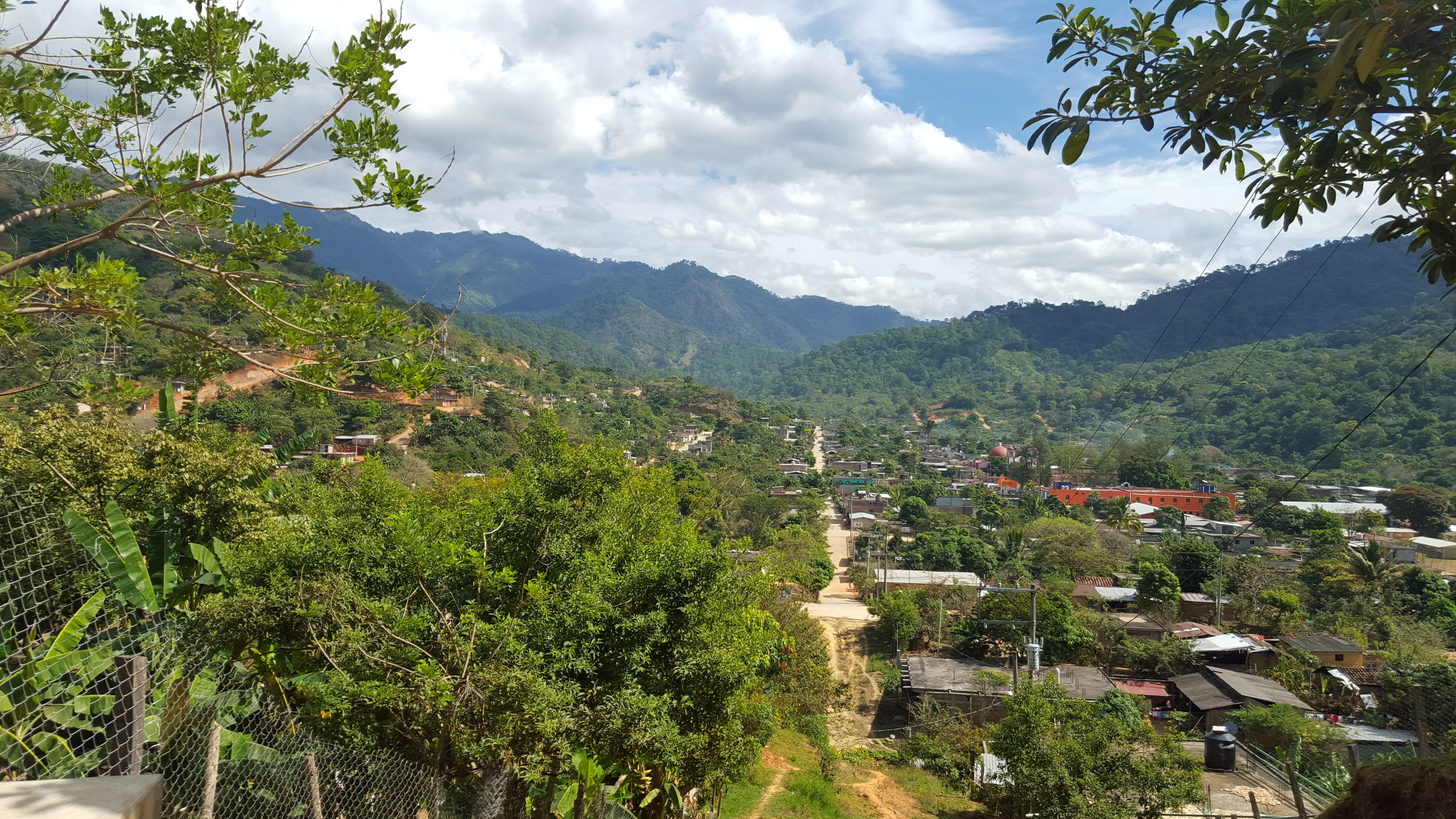 Panorámica de paisaje de Panixtlahuaca en una tarde de Diciembre del 2015